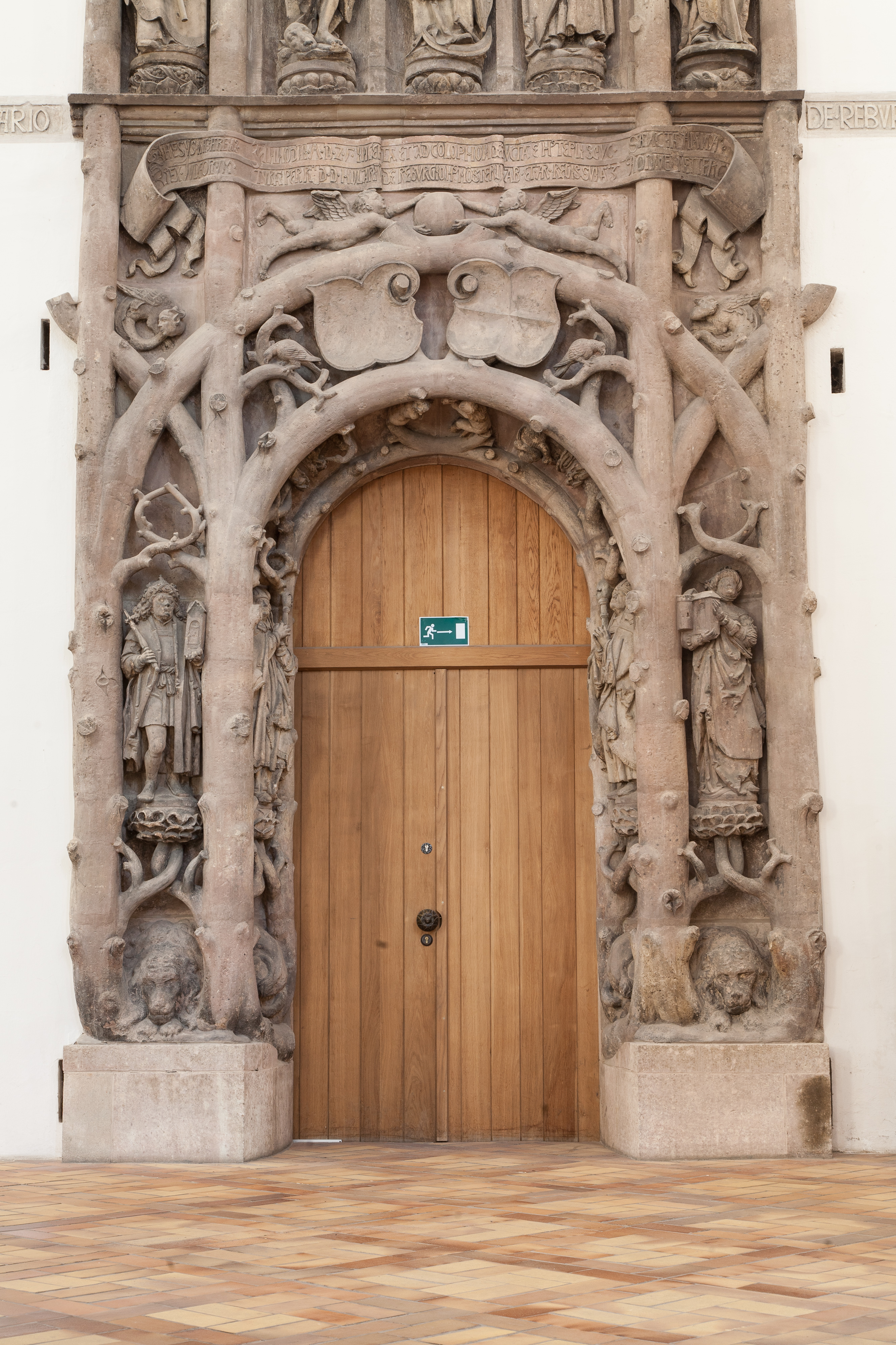 Ehem. Nordportal der Chemnitzer Schlosskirche, Portaldurchgang, gefertigt 1525 von Franz Maidburg.